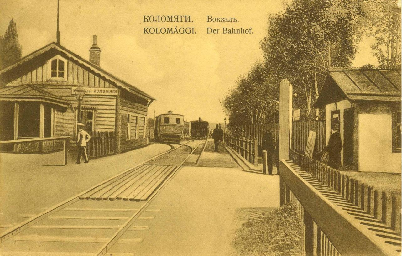 Станция Коломяги приморской железной дороги